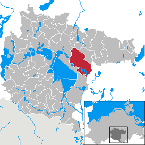 Kargow im Landkreis Müritz, Mecklenburg-Vorpommern